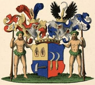 Malama suguvõsa vabahärravapp